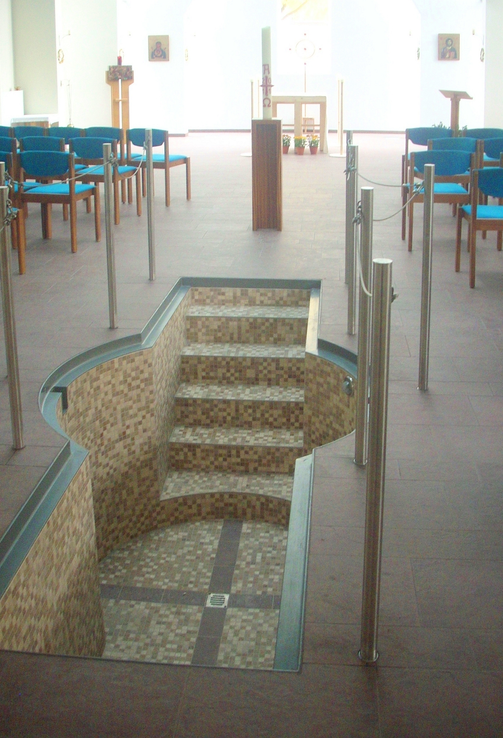 Hannover, Alt-katholische Kirche, Taufbrunnen für die Ganzkörpertaufe